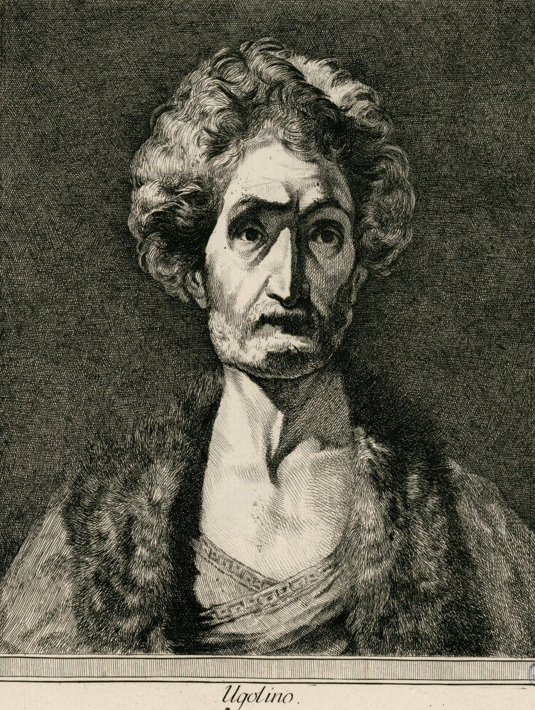 Portrait von Ugolino della Gherardesca; Stich aus Lavaters Physiognomischen Fragmenten.